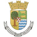 Escudo de Hatillo (Puerto Rico)